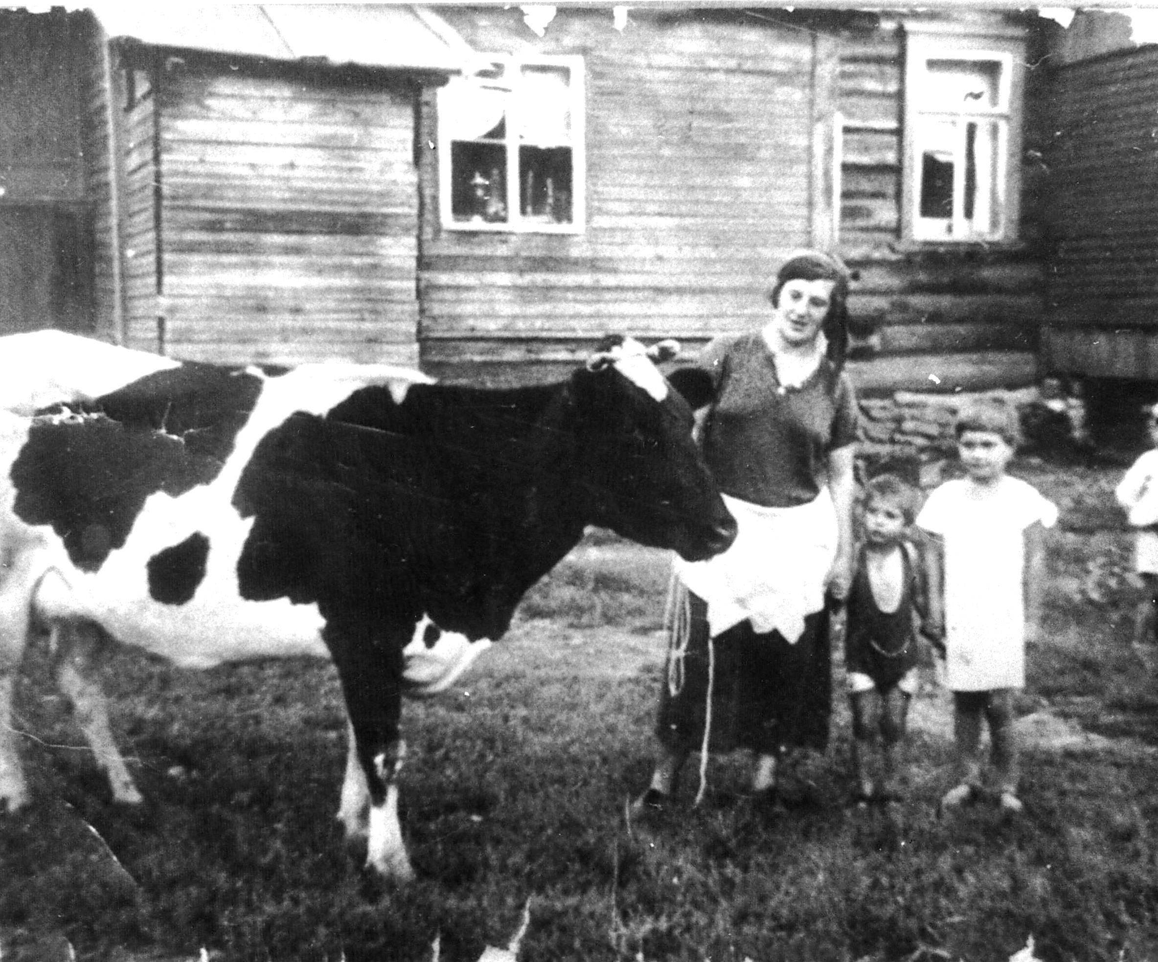 Беларуская (тарашкевіца): Нямецкая каляніская сядзіба